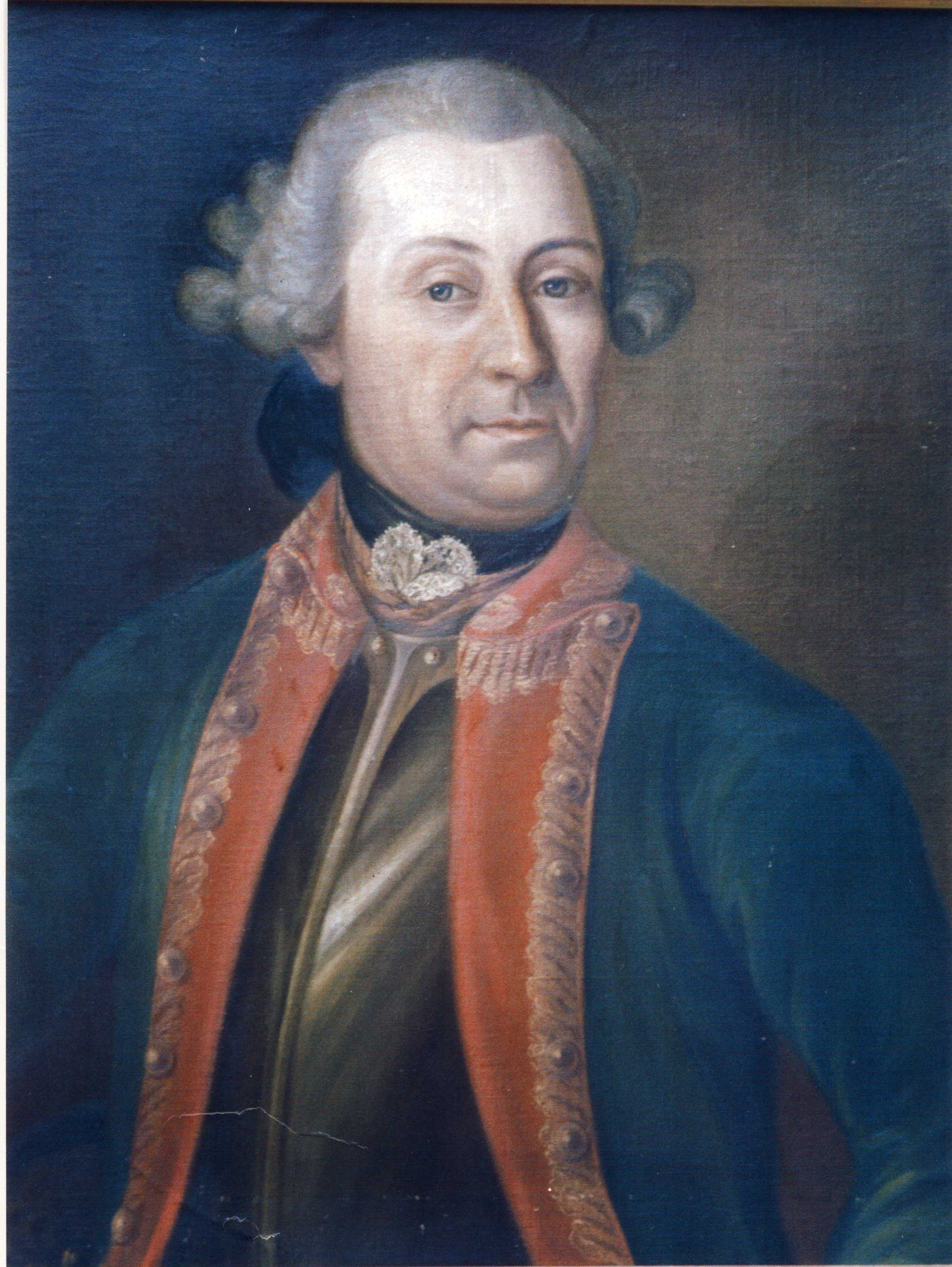 Portrait du XVIIIe siècle du général baron Christopher Heinrich von Kursell (1722-1795).